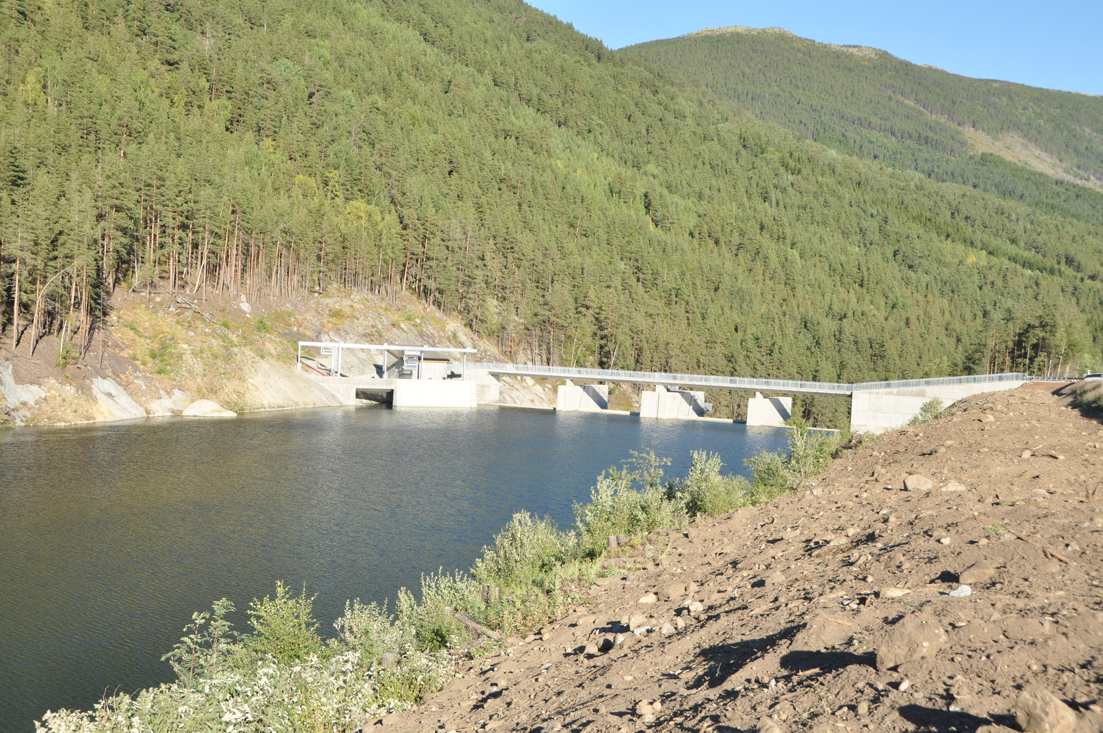 Rosten kraftverk inntaksdam